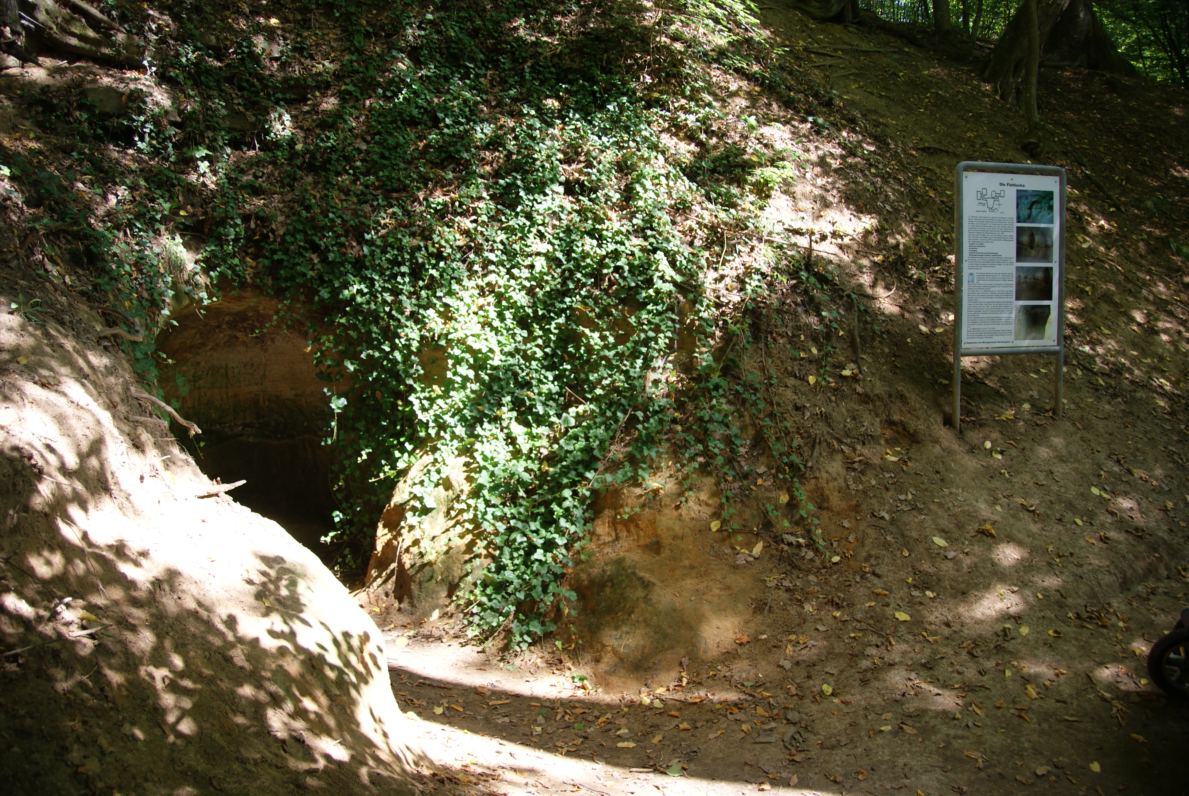 Wartberg ob der Aist, Fliehloch